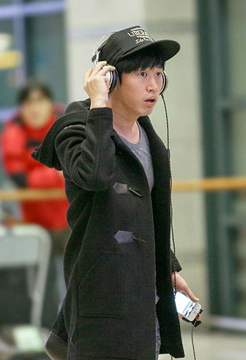 130118 인천공항 입국 타블로 직찍